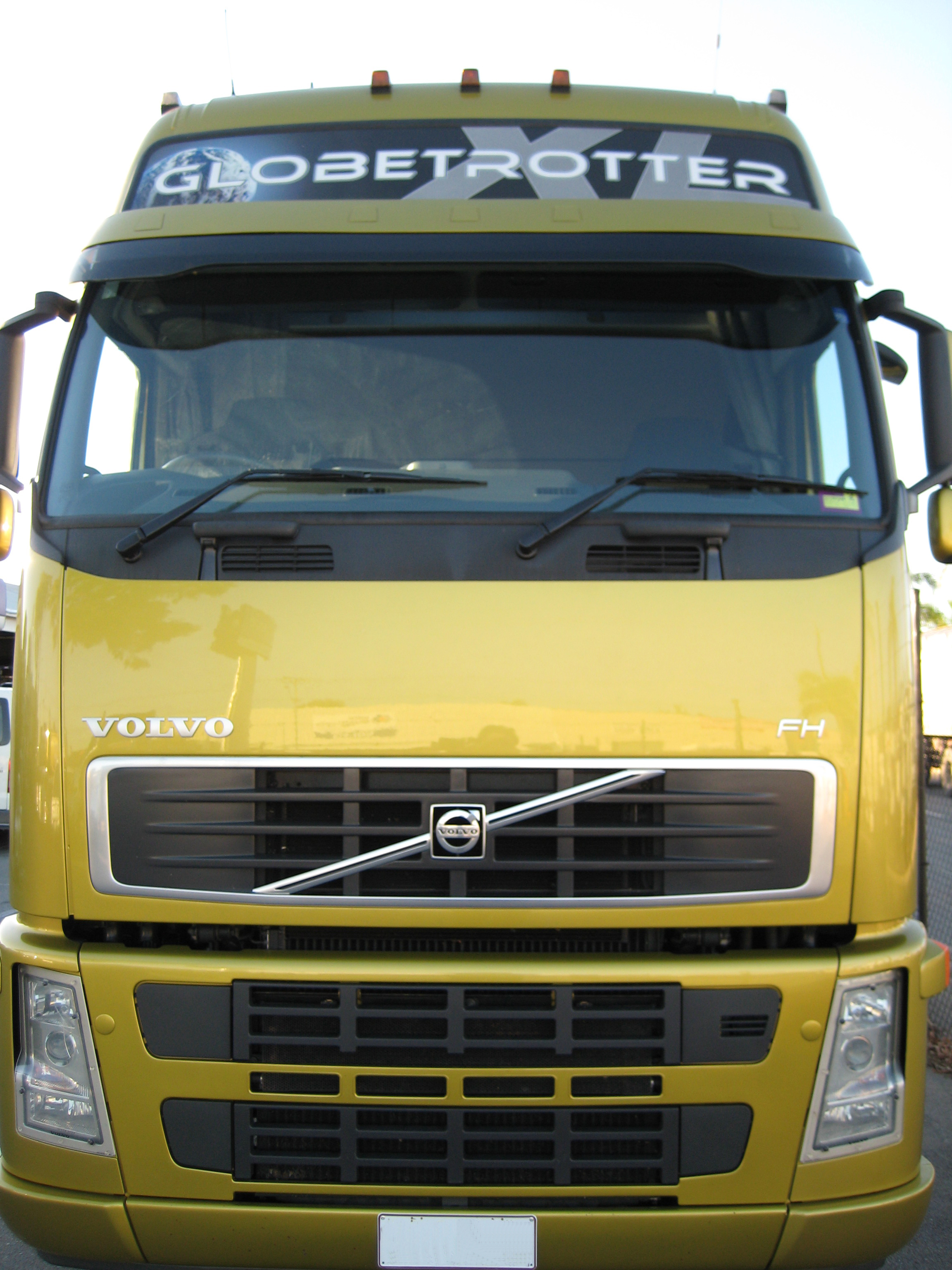 Volvo FH Globetrotter 6x4